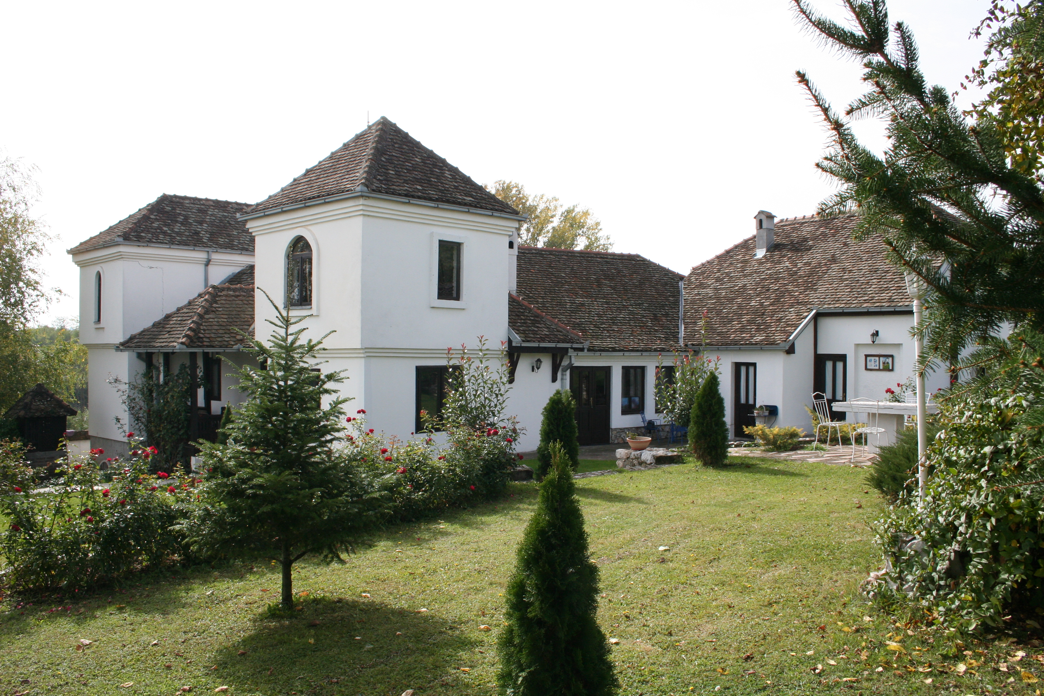 Vila Albedo, Varna